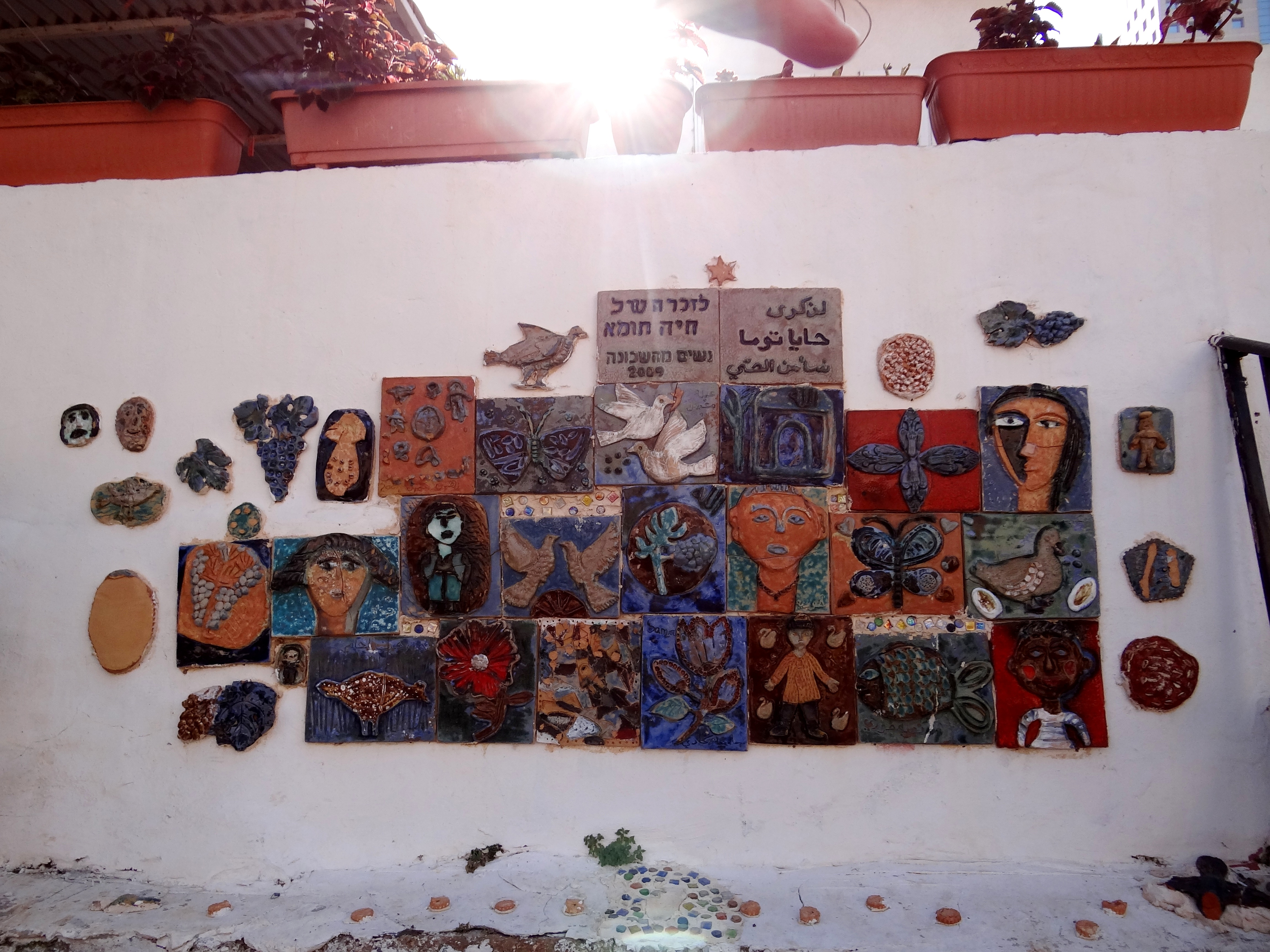 פסול קיר בואדי ניסנאס לזכרה של האמנית חיה תומא, הוכן על ידי נשים מהשכונה בשנת 2009. חלק ממסלול חיה תומא העובר בואדי